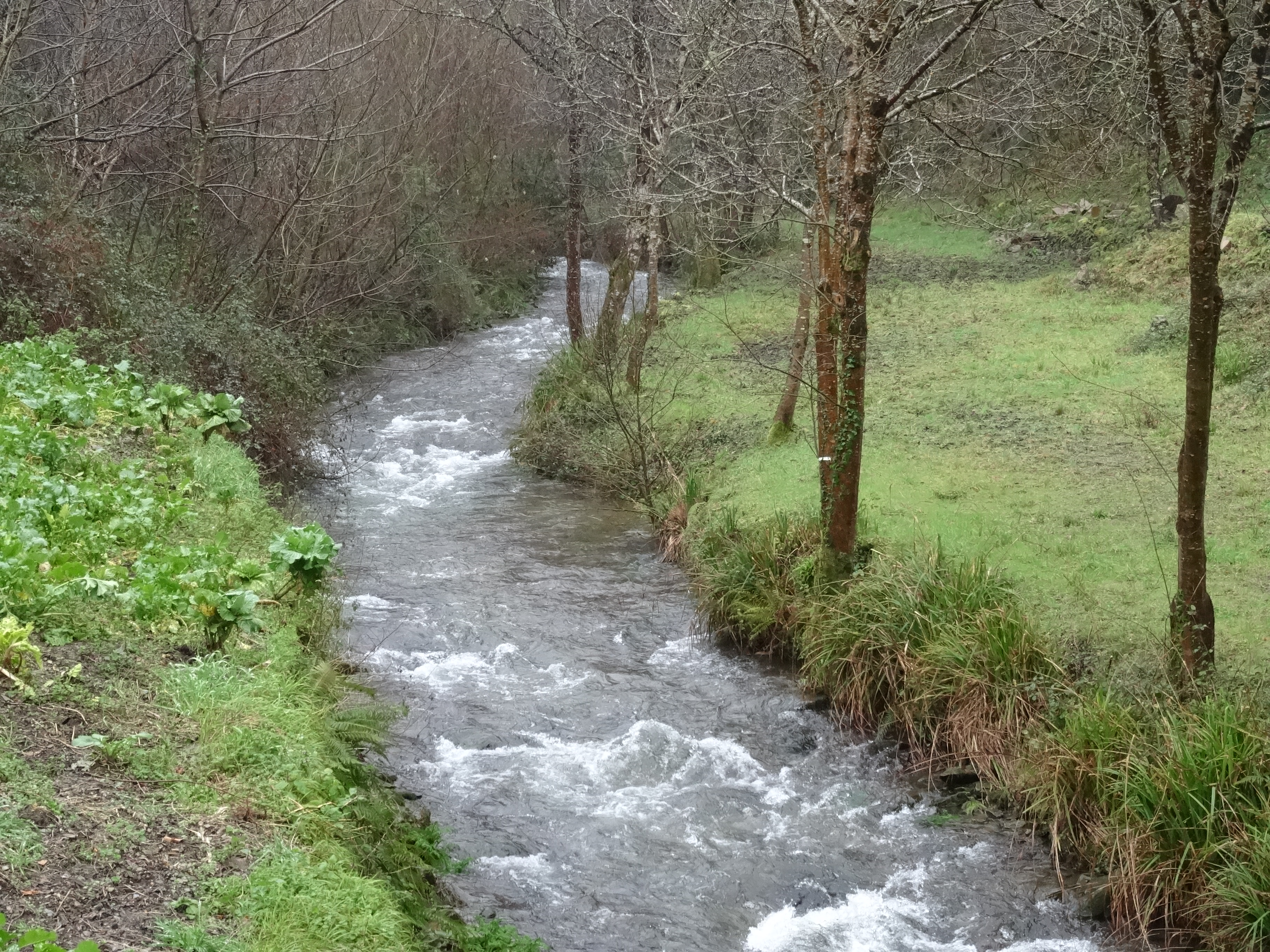 Río Turía antes de recibir a auga do río Cabreira.